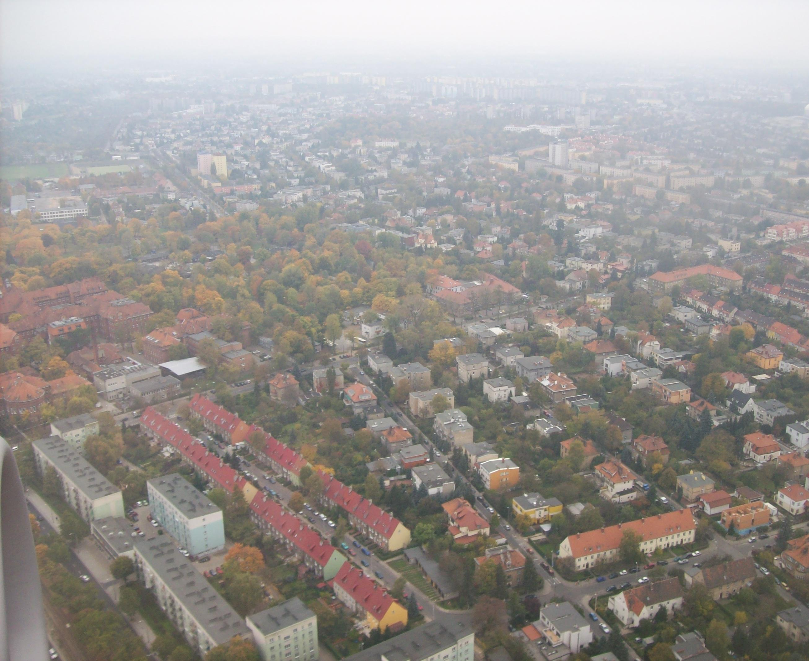 Panorama osiedla Grunwald w Poznaniu - widok z lądującego samolotu.